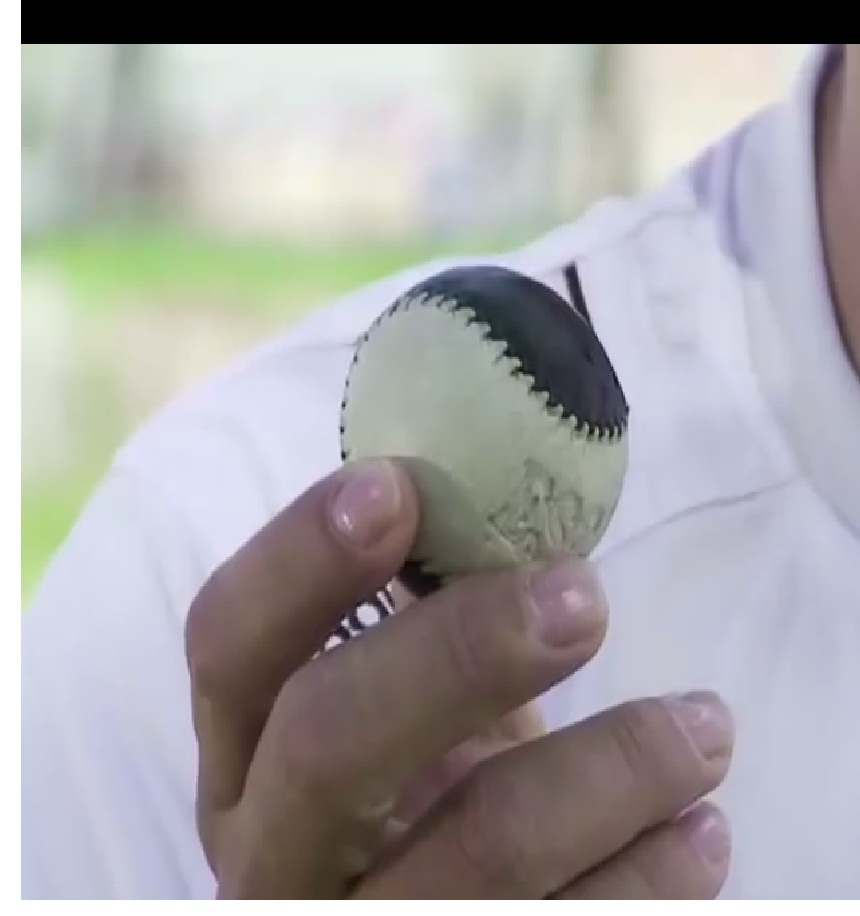 Bola utilizada para la chaza y para la pelota vasca